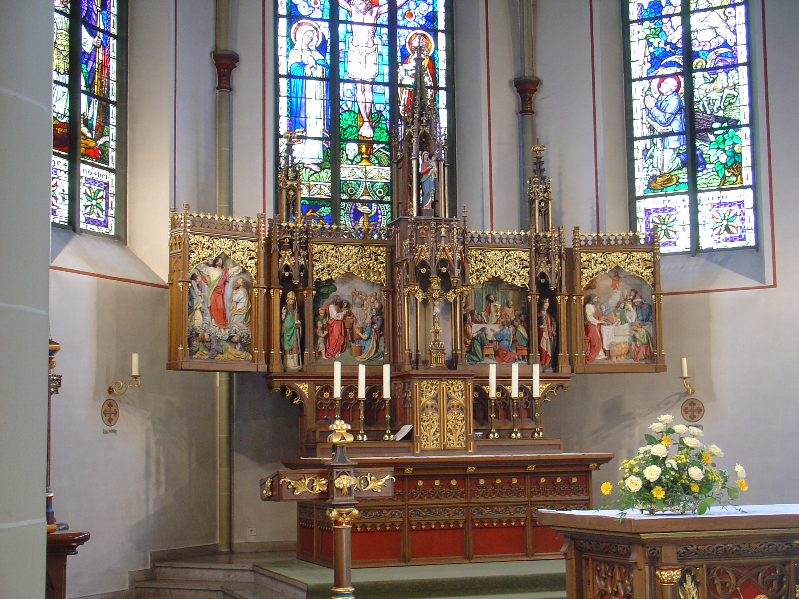 Hauptaltar von St. Joseph in Delbrück-Westenholz